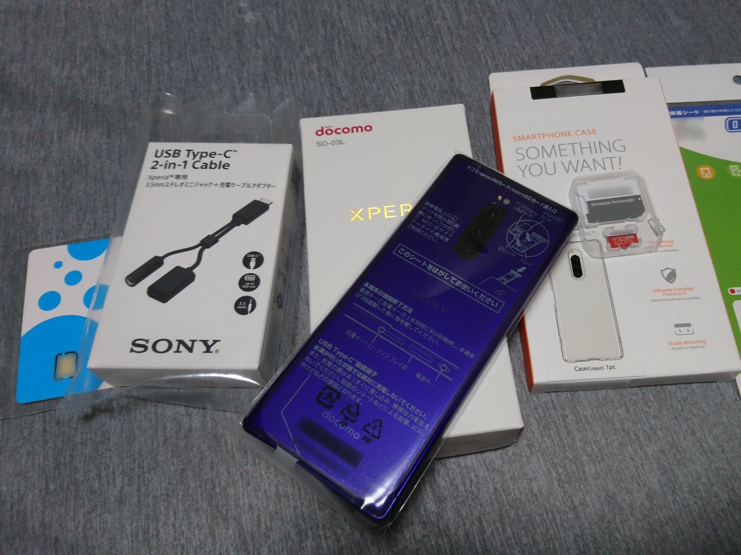 Xperia 1(SO-03L)背面